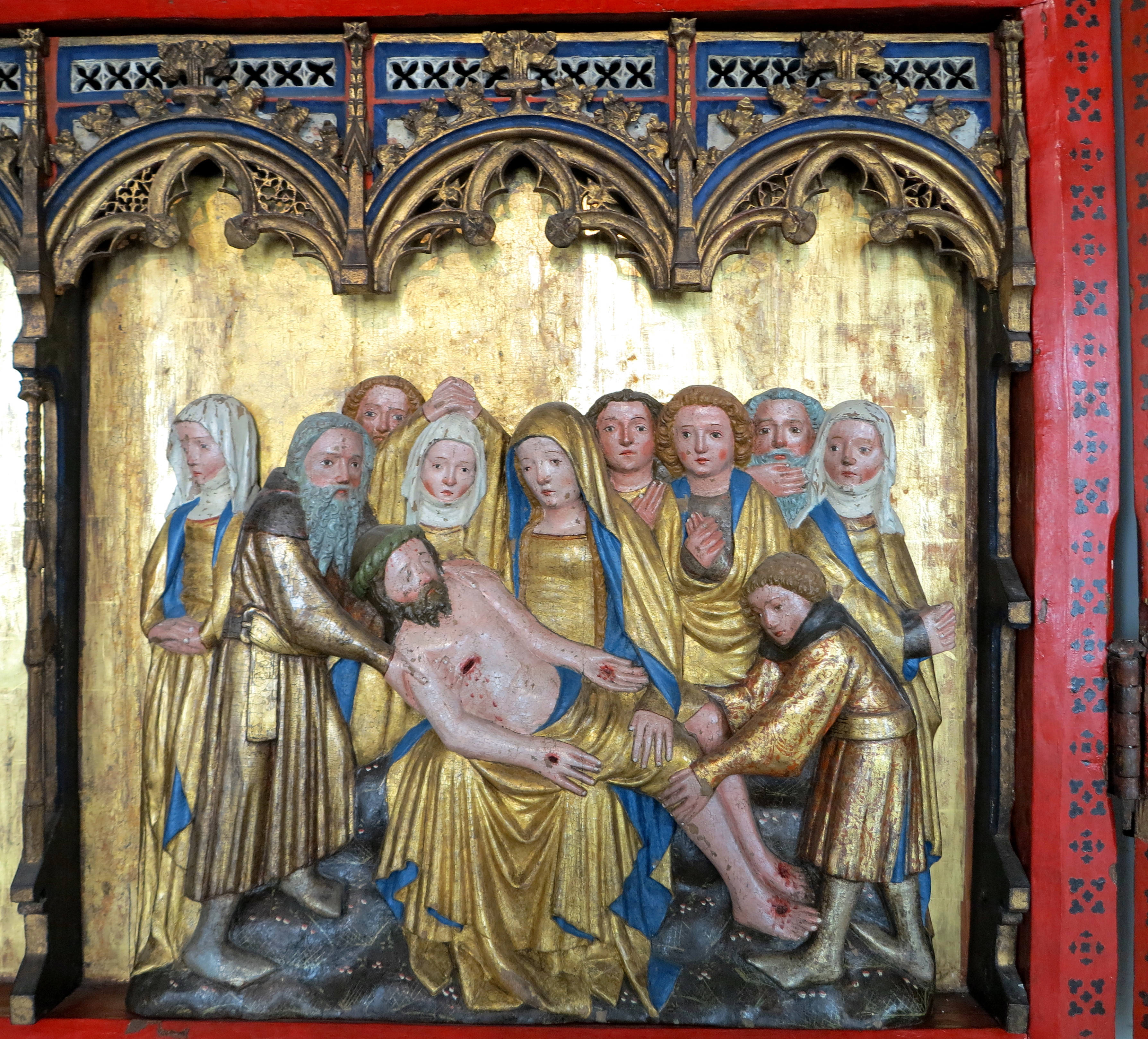 Landkirchener Retabel i midfeltet: Begrædelse Kristi